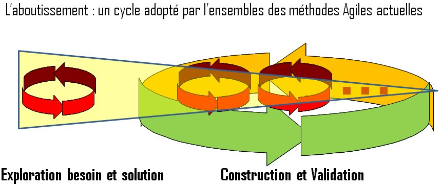 Les méthodes actuelles sont toutes semi-itératives